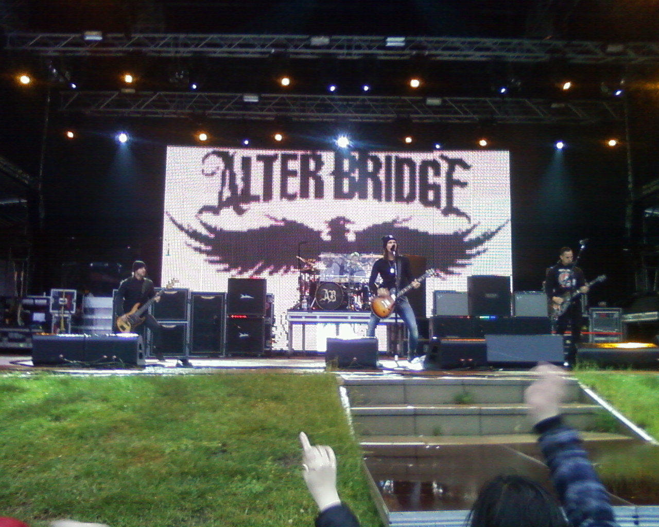 Alter Bridge auf der Freilichtbühne des Hamburger Stadtparks